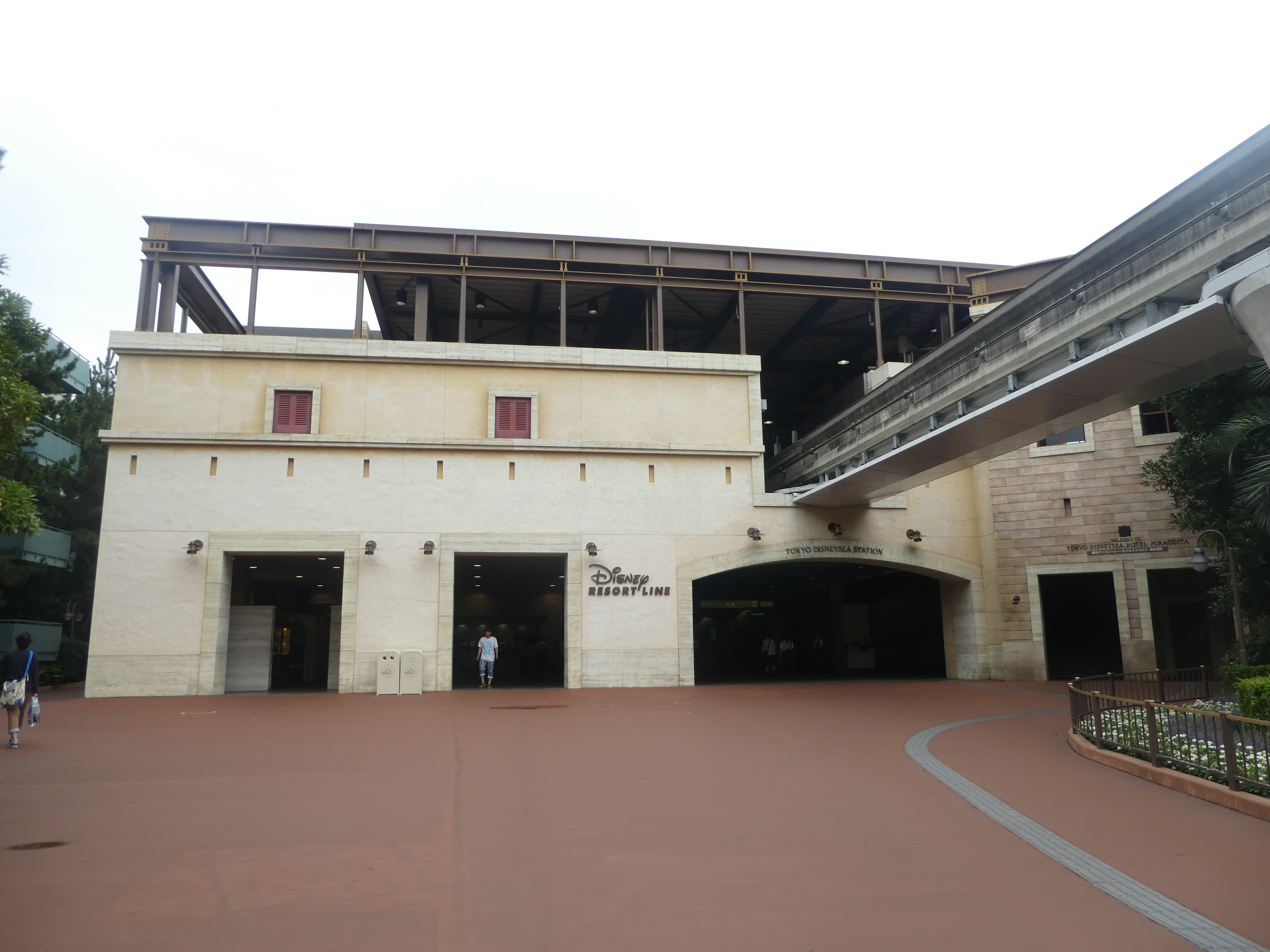 東京ディズニーシー・ステーション。